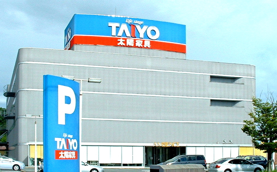 太陽家具百貨店本社